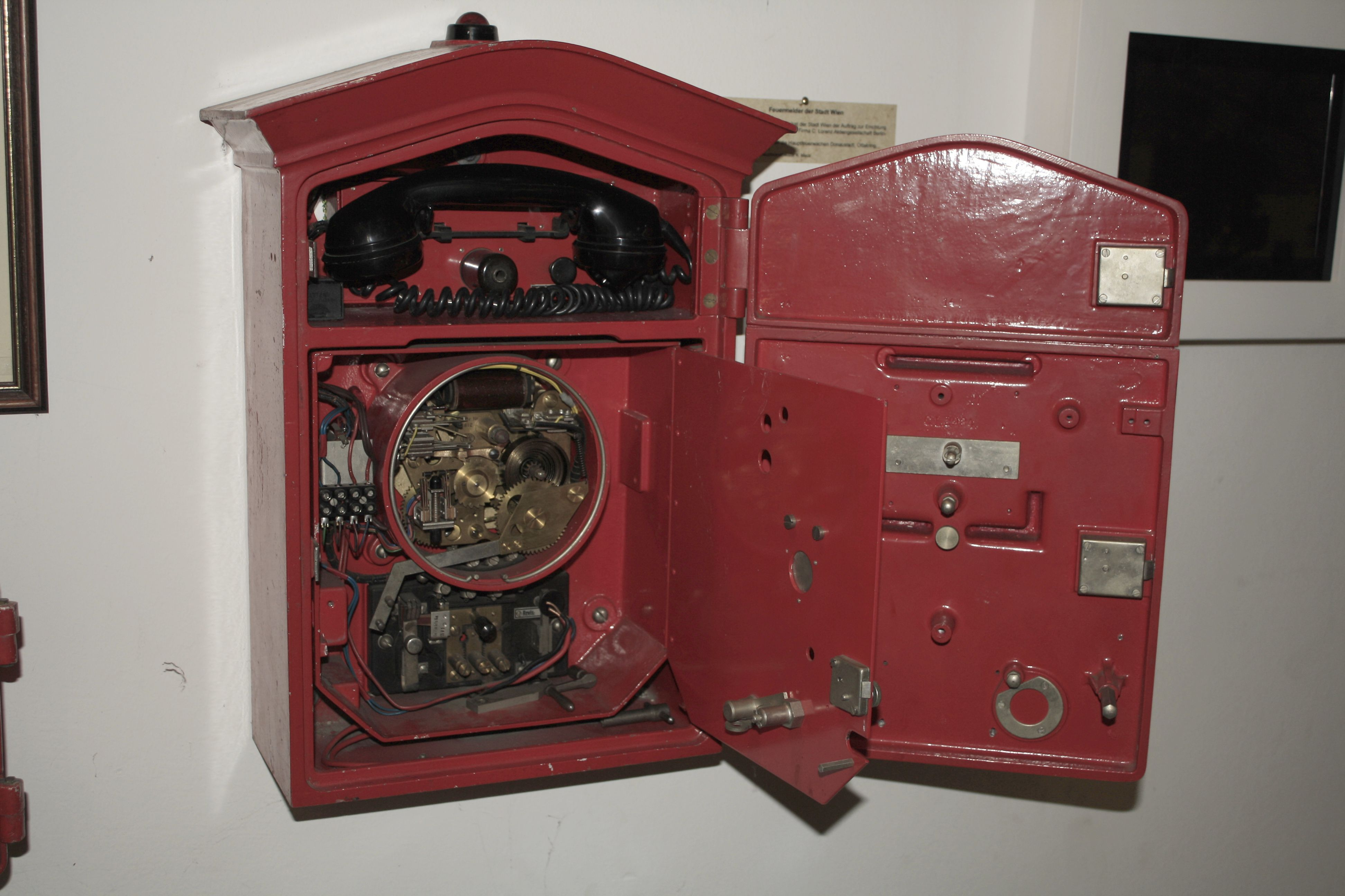 Historischer Feuermelder, geöffnet, der Feuerwehr Wien im Feuerwehrmuseum Perchtoldsdorf, Niederösterreich